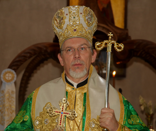 Ο Σεβασμιώτατος Μητροπολίτης Σουηδίας κ.Κλεόπας